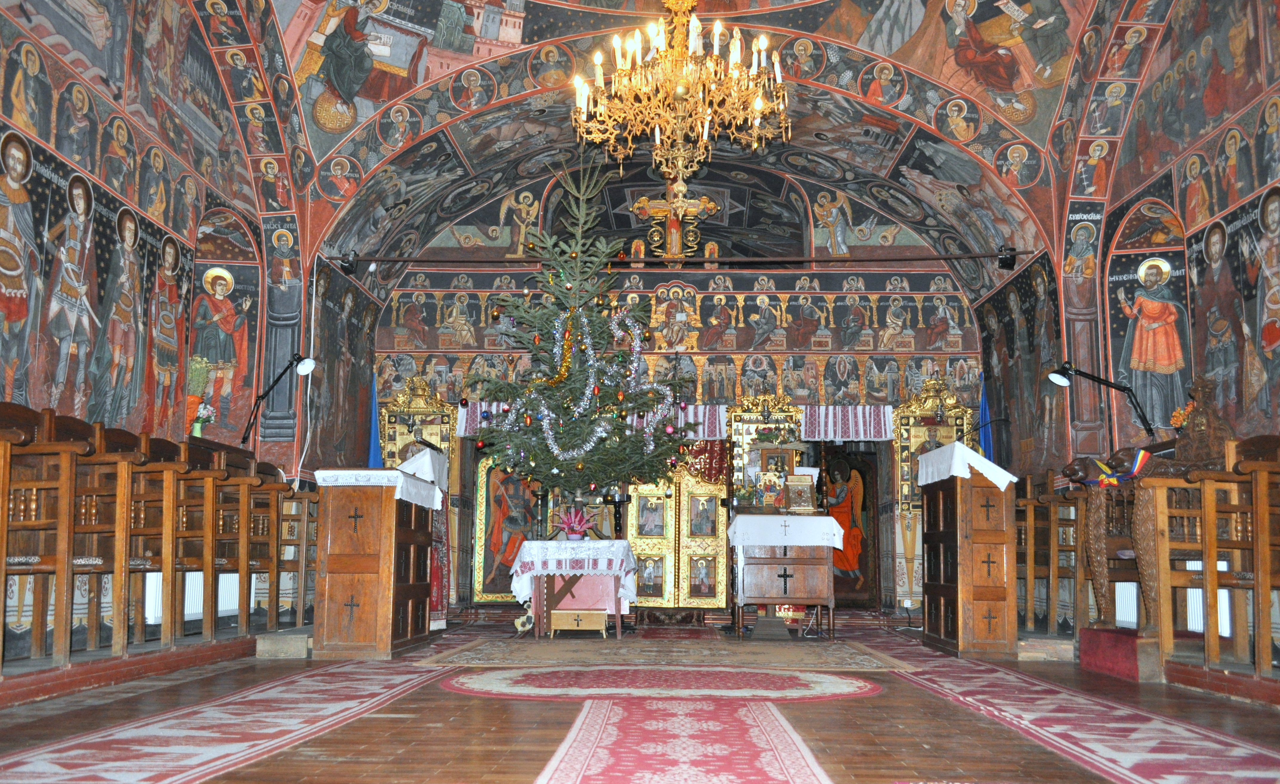 Biserica "Sf. Nicolae" din Mohu, județul Sibiu